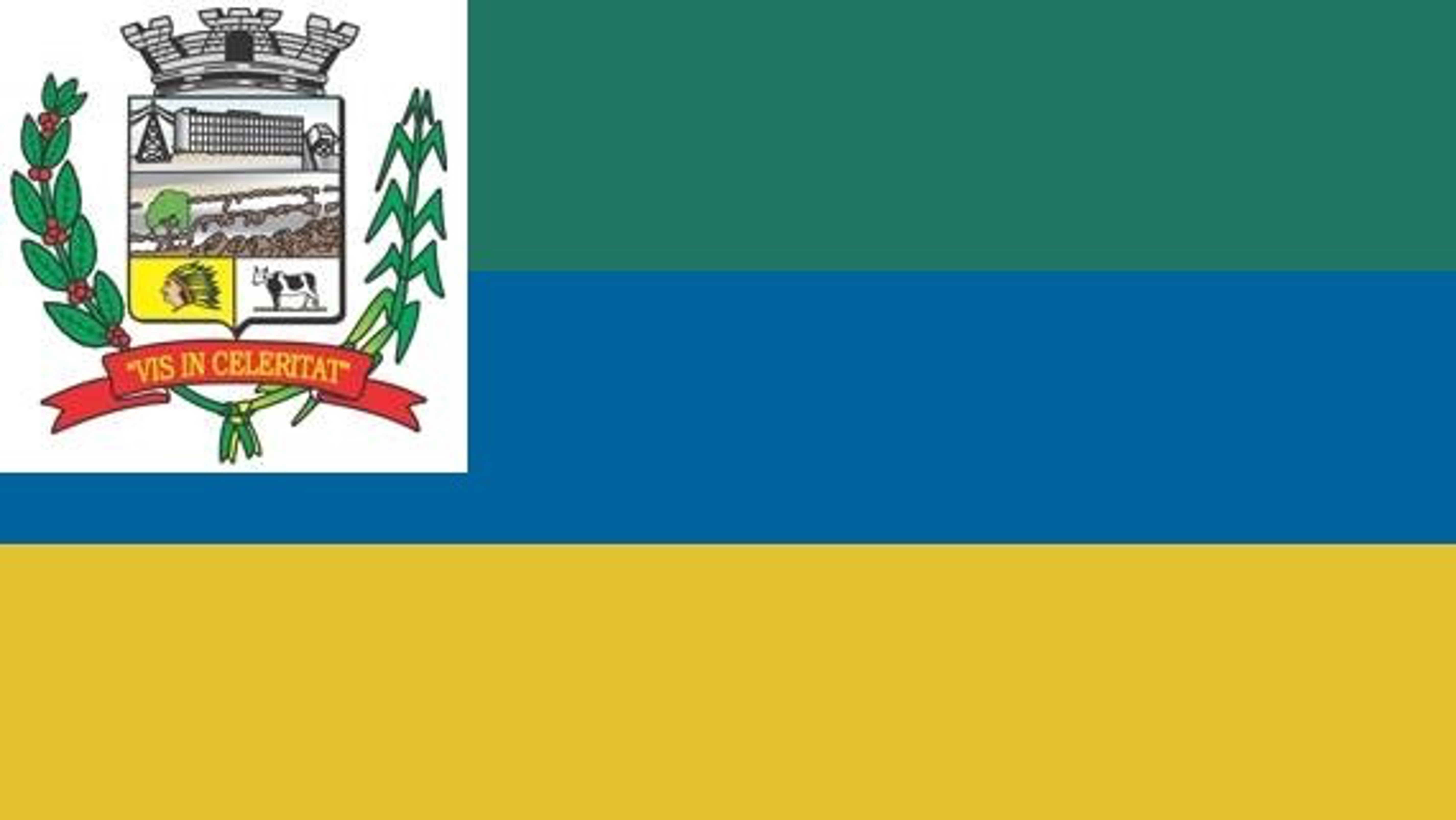 Bandeira do município de Santo Grande - SP - Brasil.